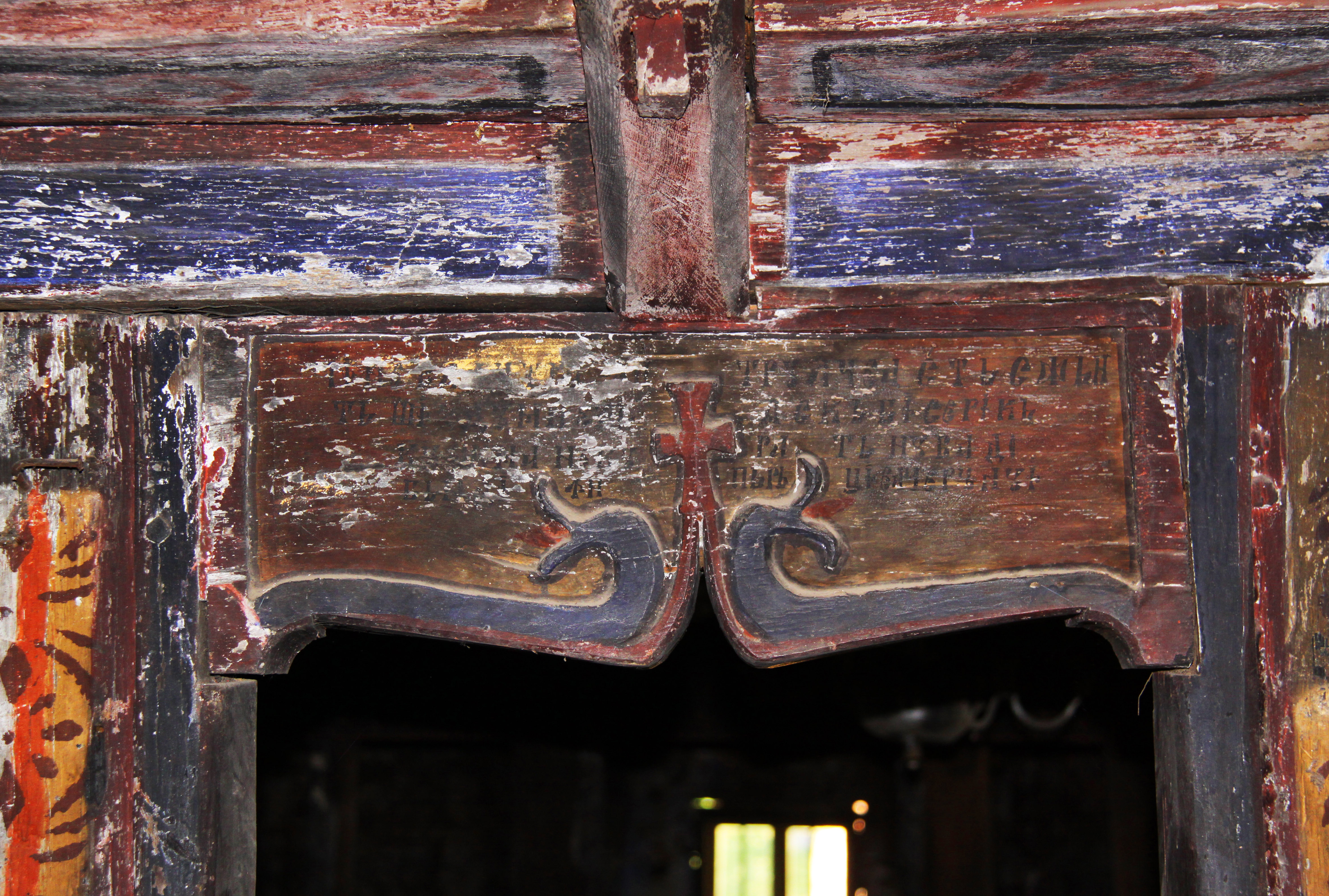 Ibăneşti, Olt: biserica de lemn, portal spre naos.